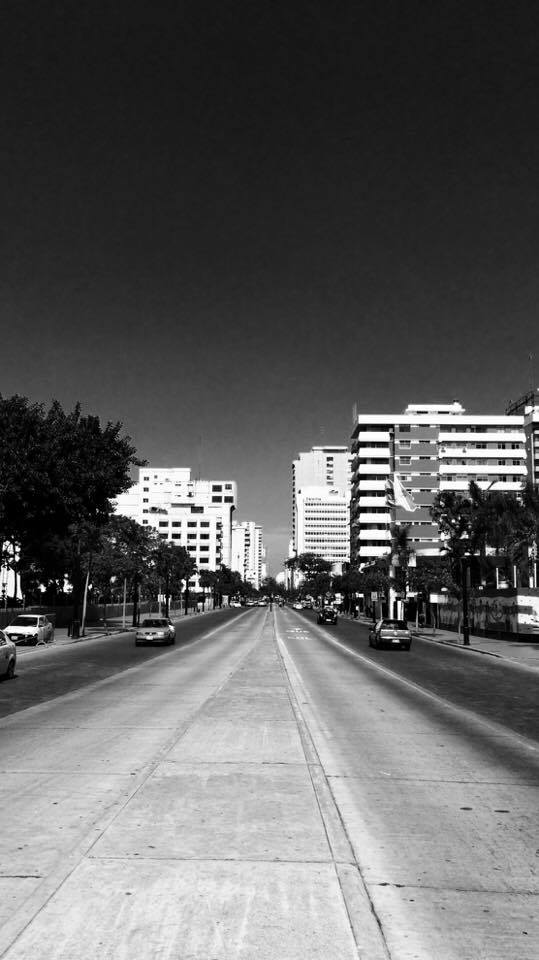 El inicio de la Gran 9 de Octubre en Guayquil.